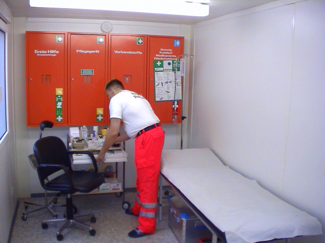 Betriebssanitäter